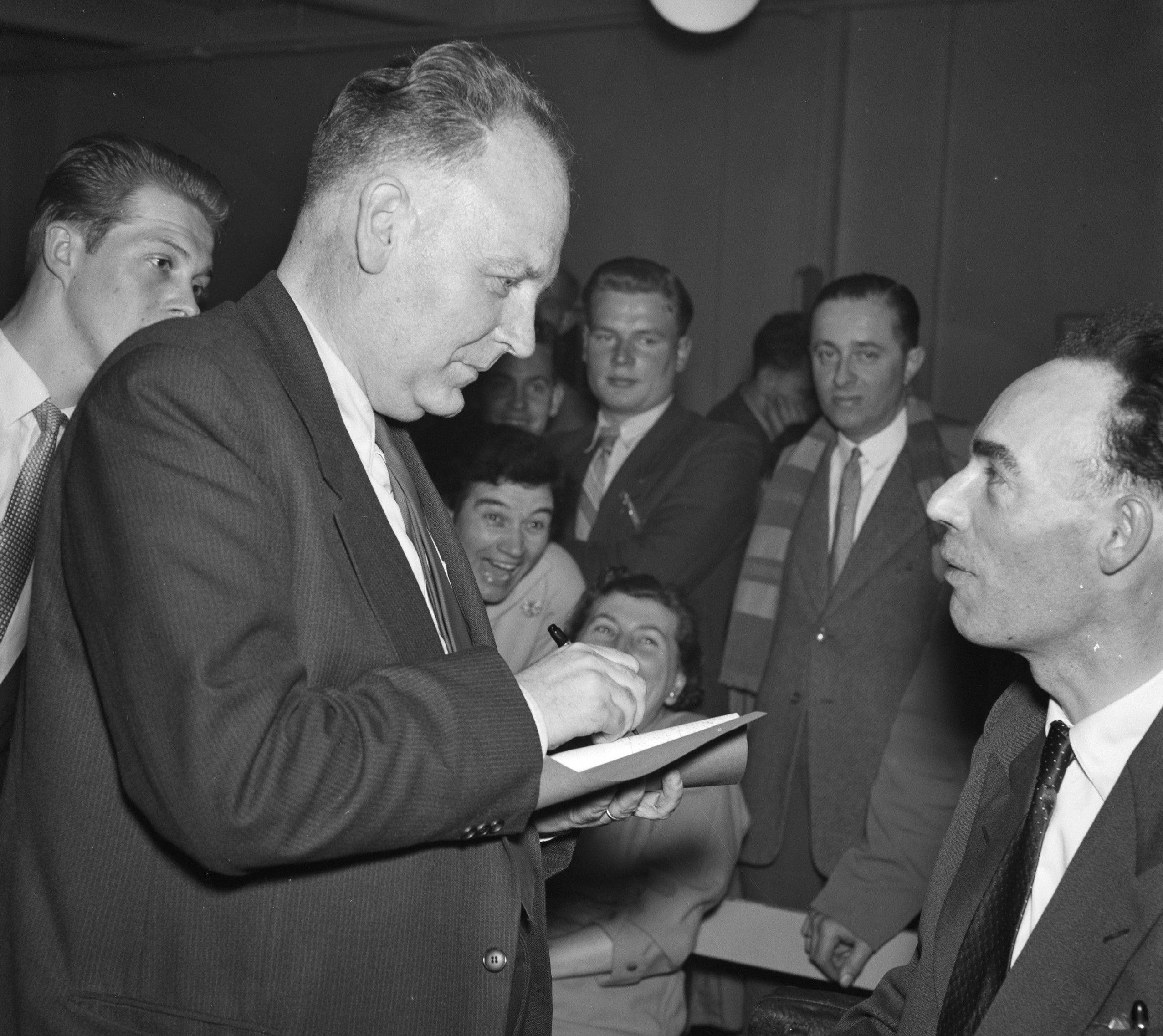 Collectie / Archief : Fotocollectie Anefo Reportage / Serie : [ onbekend ] Beschrijving : Damkampioenschap Nederland. Wim Roozenburg (rechts) winnaar Annotatie : Links R.C. Keller, meervoudig Nederlands kampioen Datum : 9 maart 1957 Locatie : Nederland Trefwoorden : damsport Persoonsnaam : Keller, R.C., Roozenburg, Wim Fotograaf : Rossem, Wim van / Anefo Auteursrechthebbende : Nationaal Archief Materiaalsoort : Negatief (zwart/wit) Nummer archiefinventaris : bekijk toegang 2.24.01.04 Bestanddeelnummer : 908-3848